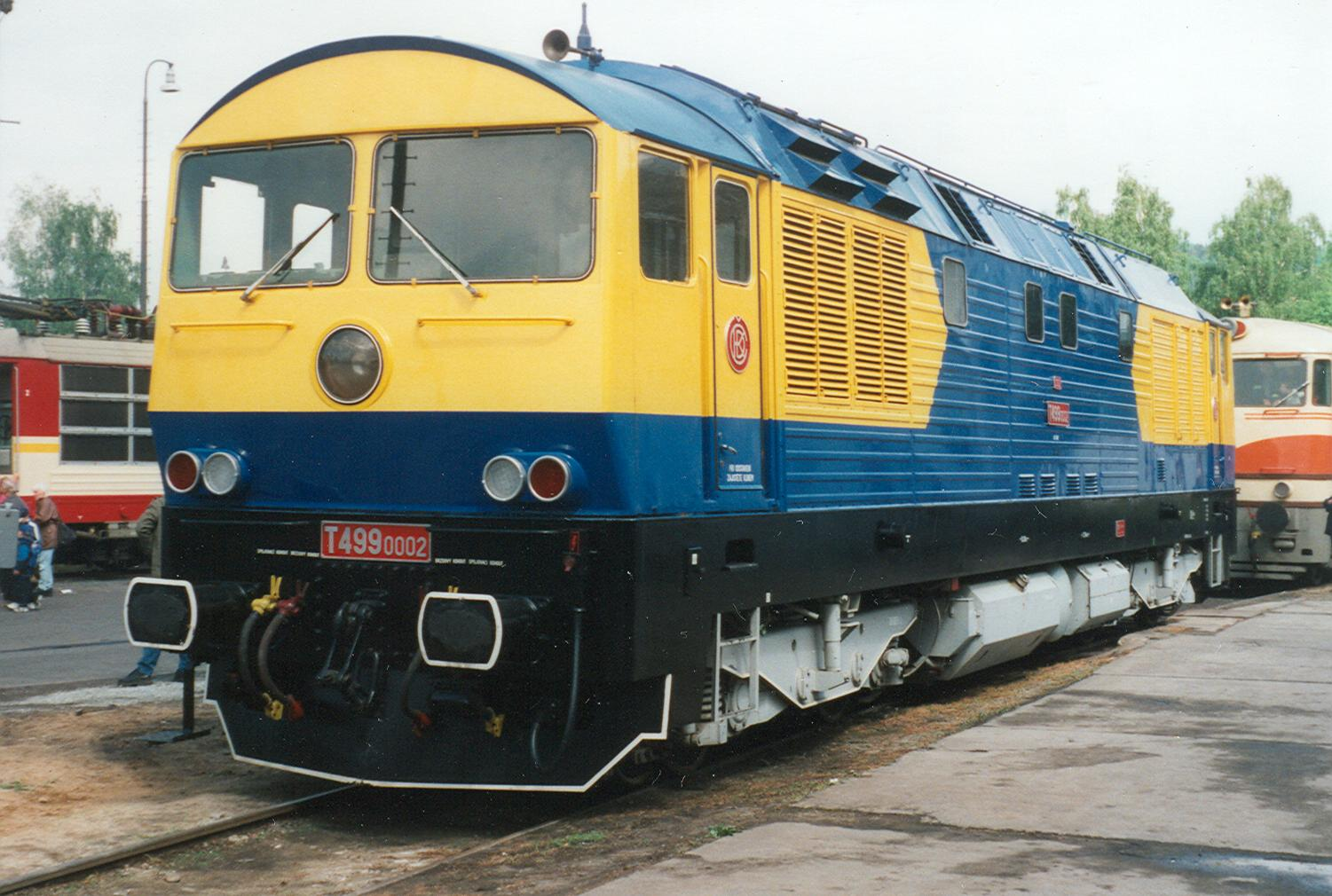 T 499.0002 auf einer Eisenbahnausstellung in Děčín... Sonstiges: ...